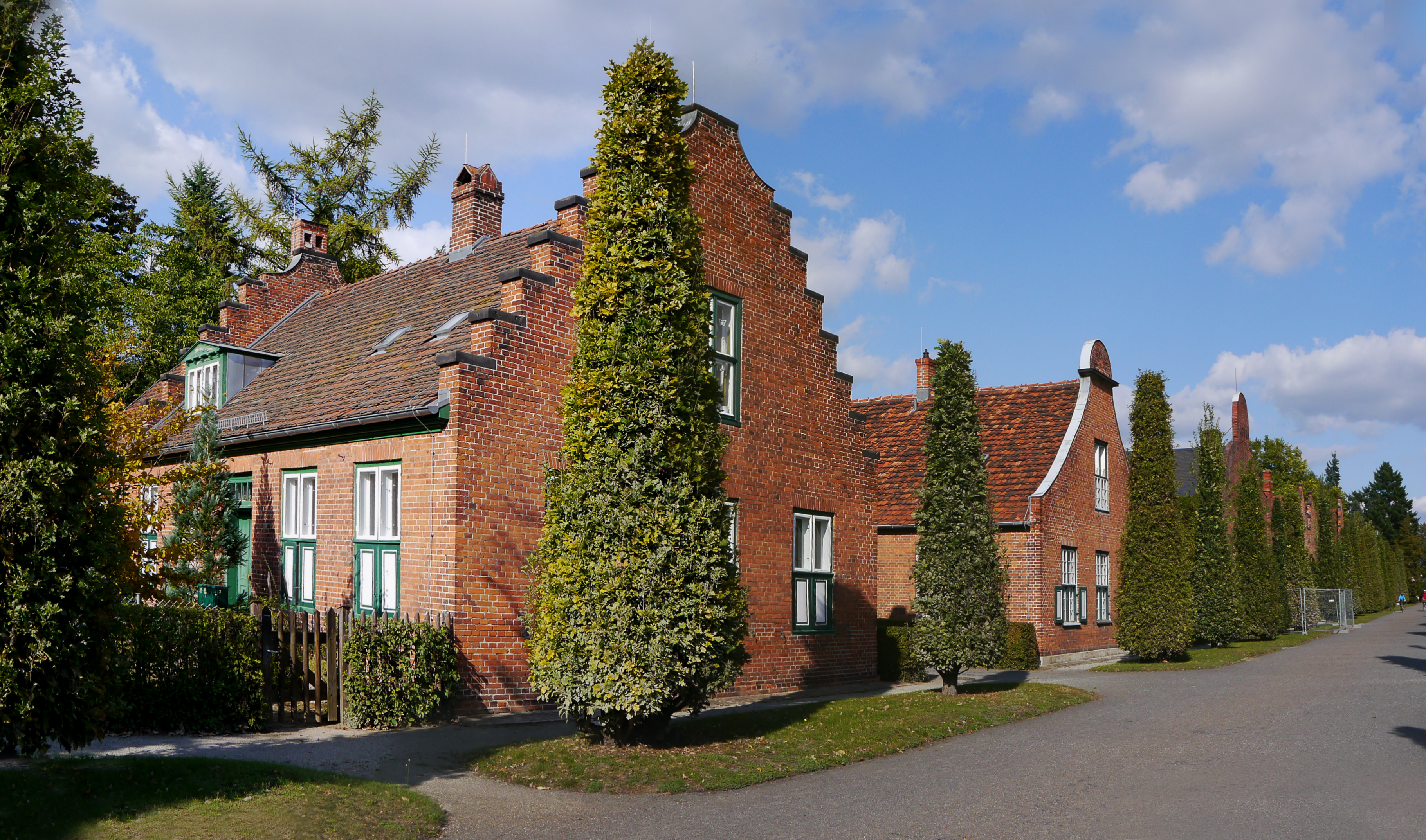 Baudenkmal: Potsdam, Neuer Garten, Holländische Häuser